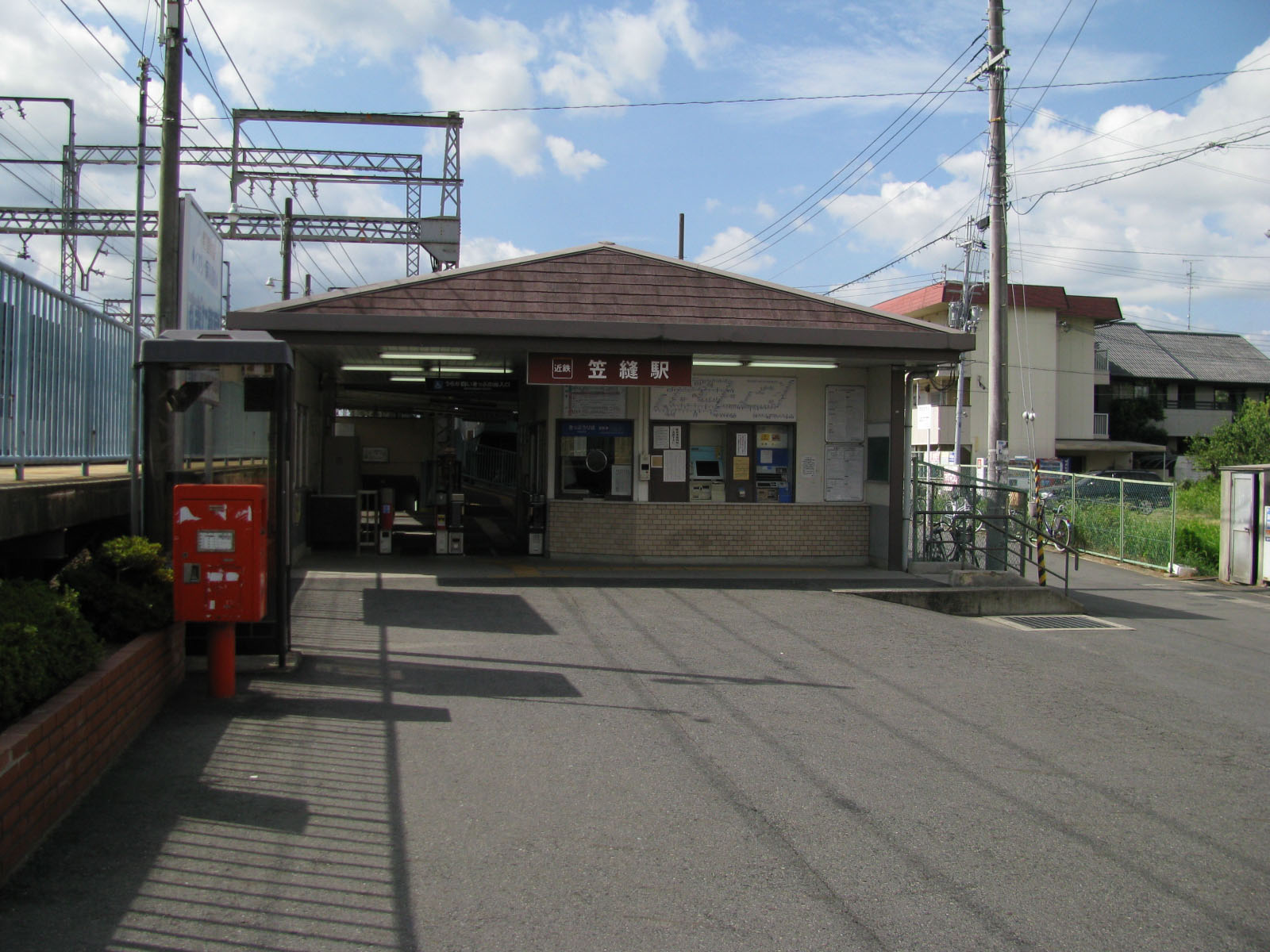 近鉄橿原線笠縫駅